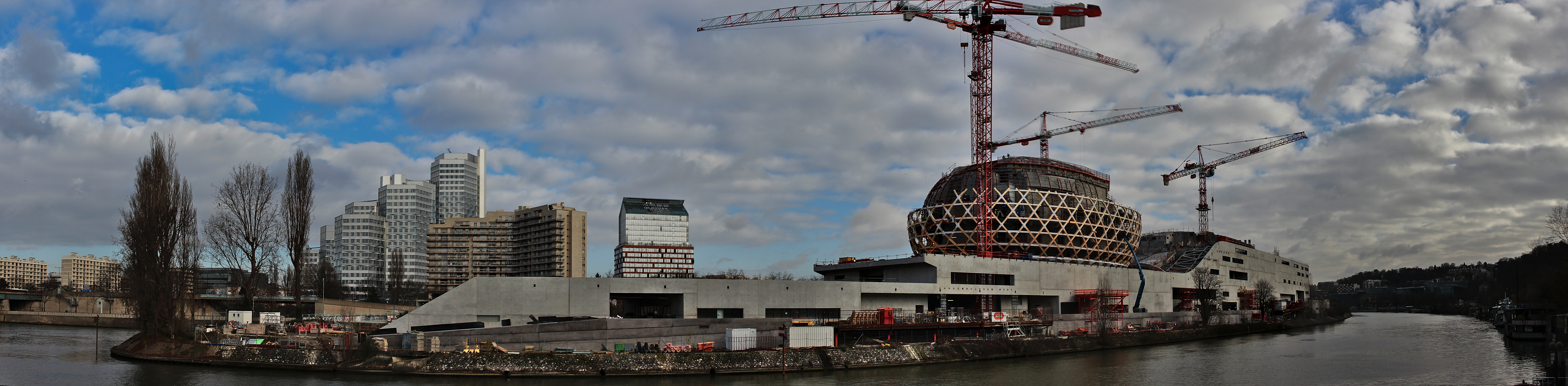 Ile Seguin - Jan 2016 - Cité Musicale en construction vue de Meudon